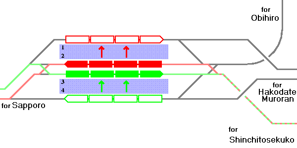 南千歳駅での対面乗り換えの説明図。user:Matsukaze作成。